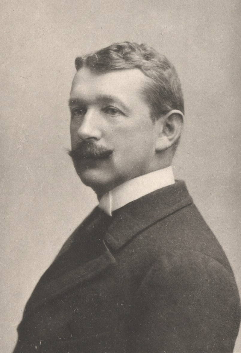 Mogens Christian lensgreve Krag-Juel-Vind-Frijs (1849–1923), landstingsmand.